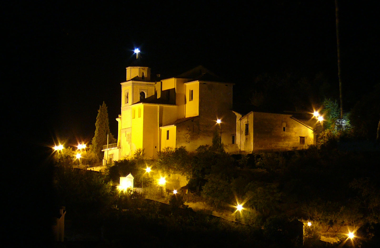 S.S.Salvatore, Baronissi, Salerno, Italy